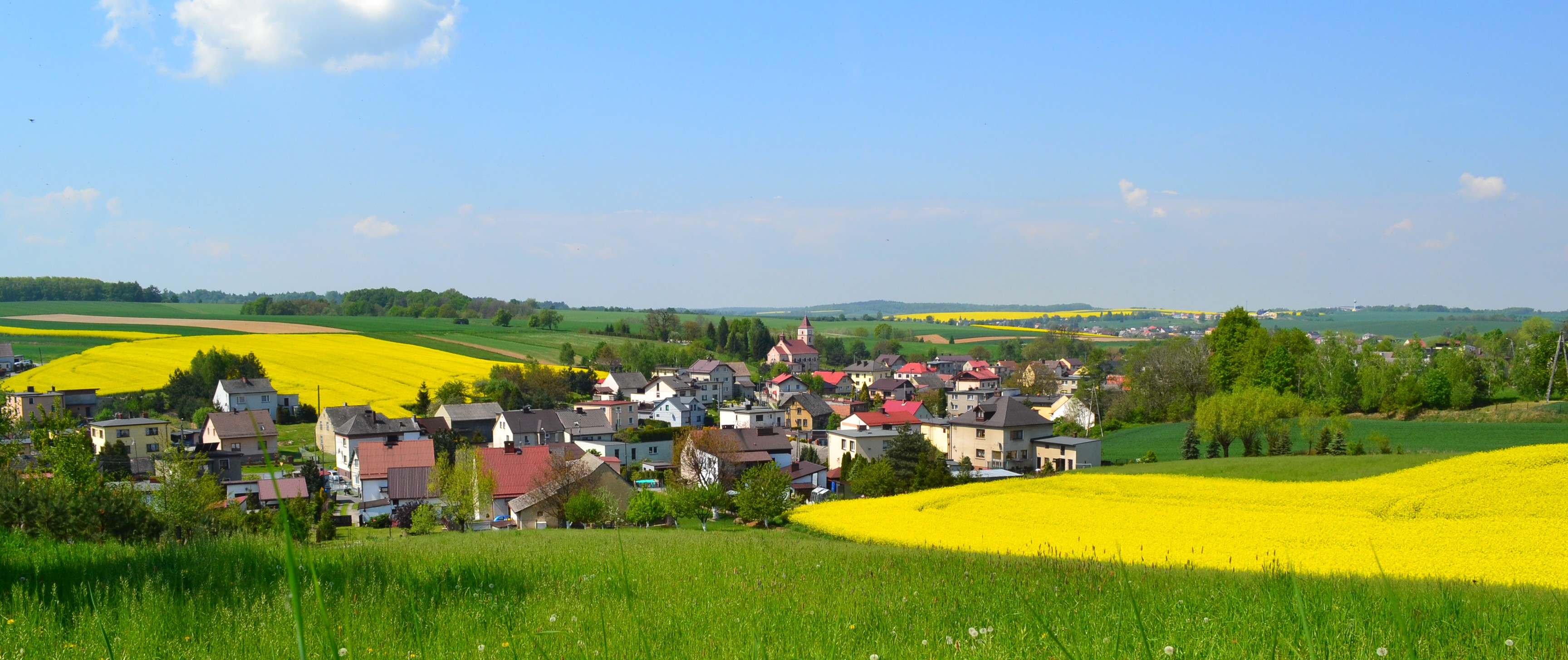 Owsiszcze